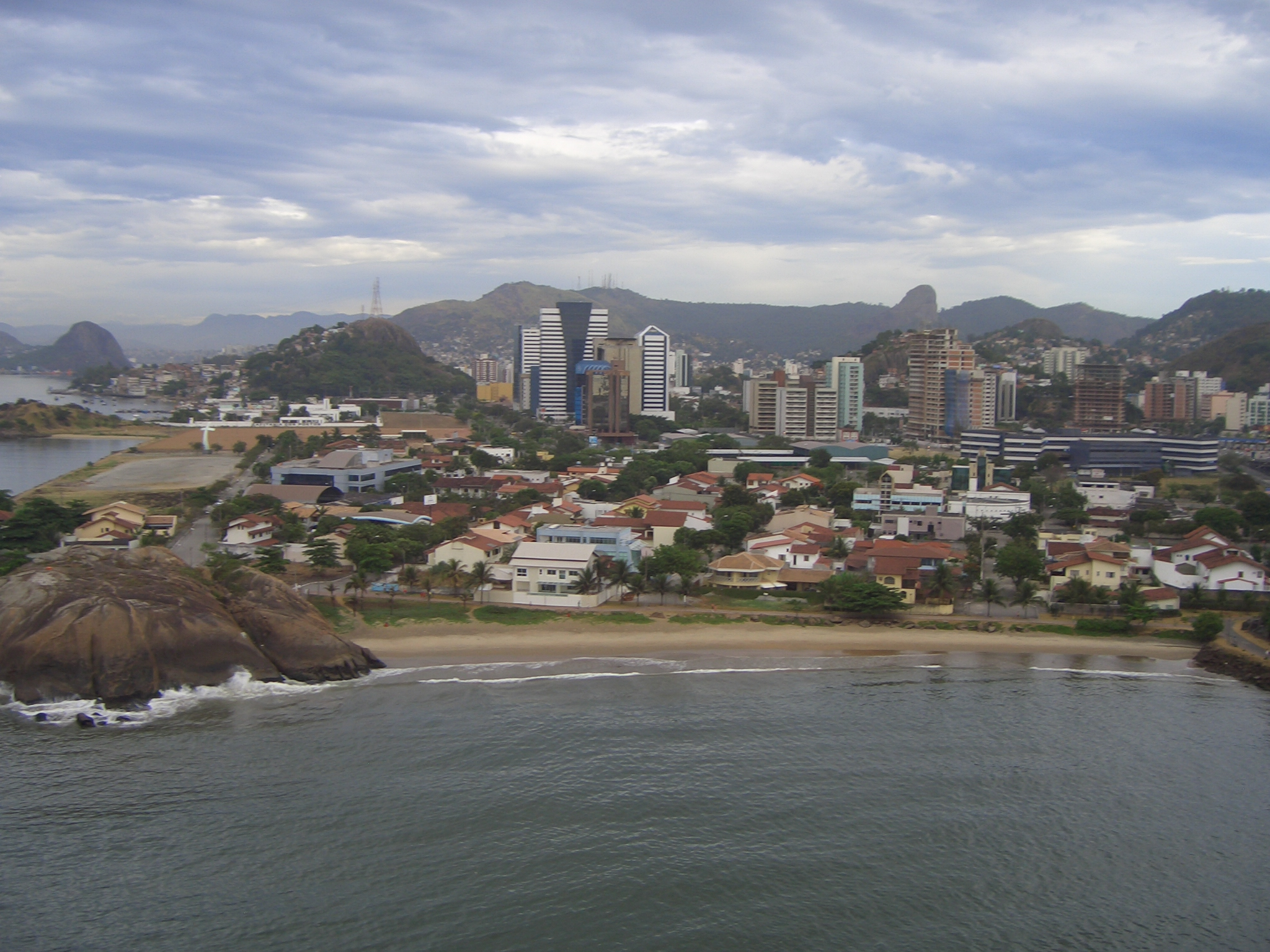 Esneada soSuá em Vitória Autor: Junior Pedruzzi